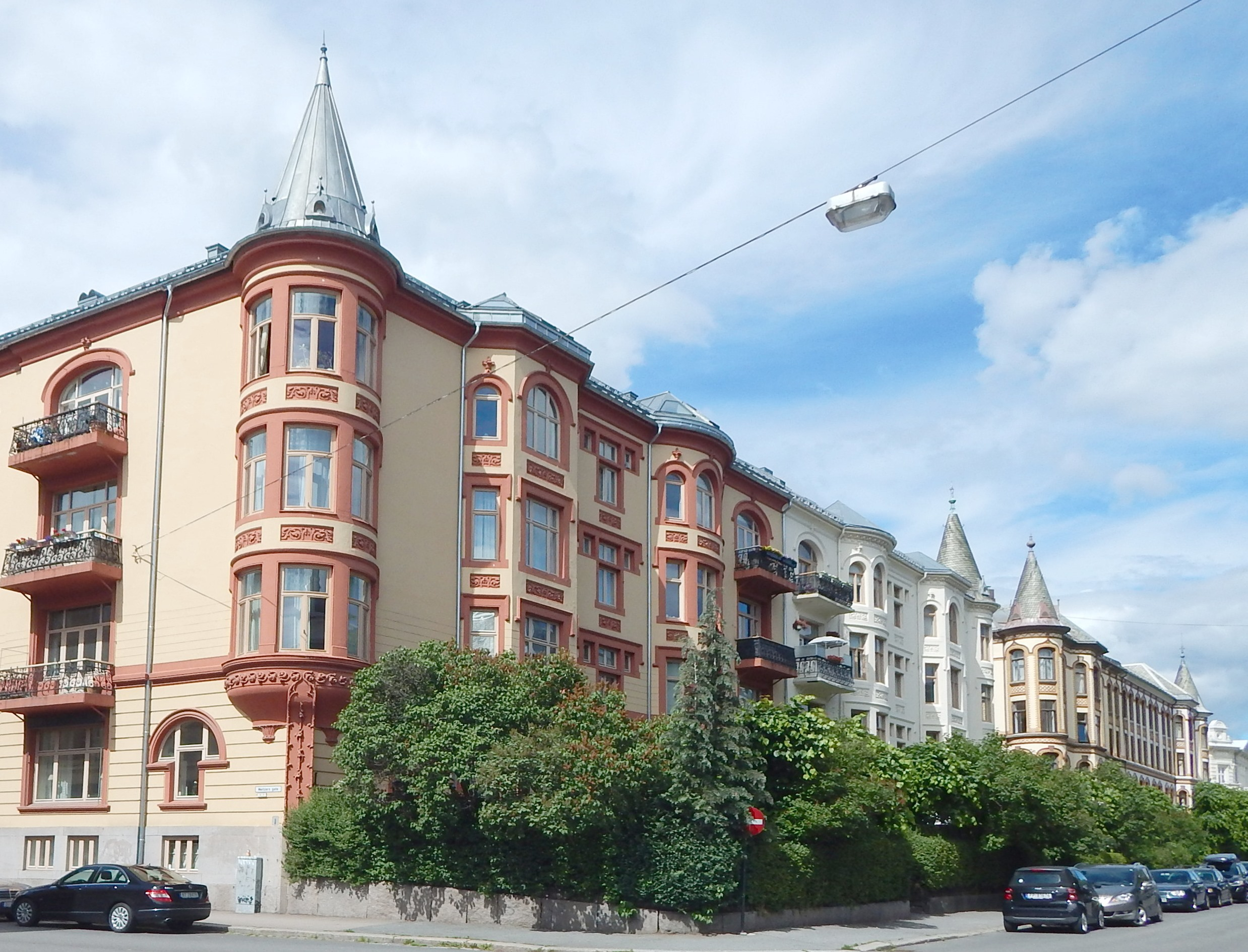 Oscars gate østover fra Meltzers gate (nr. 65, 63 osv.)